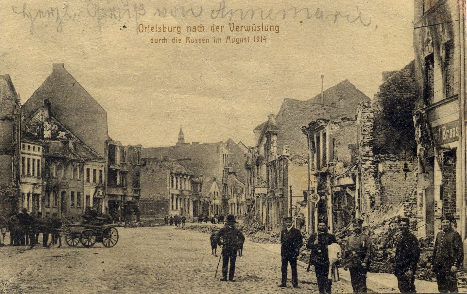 Ortelsburg nach der Verwüstung durch die Russen im August 1914.